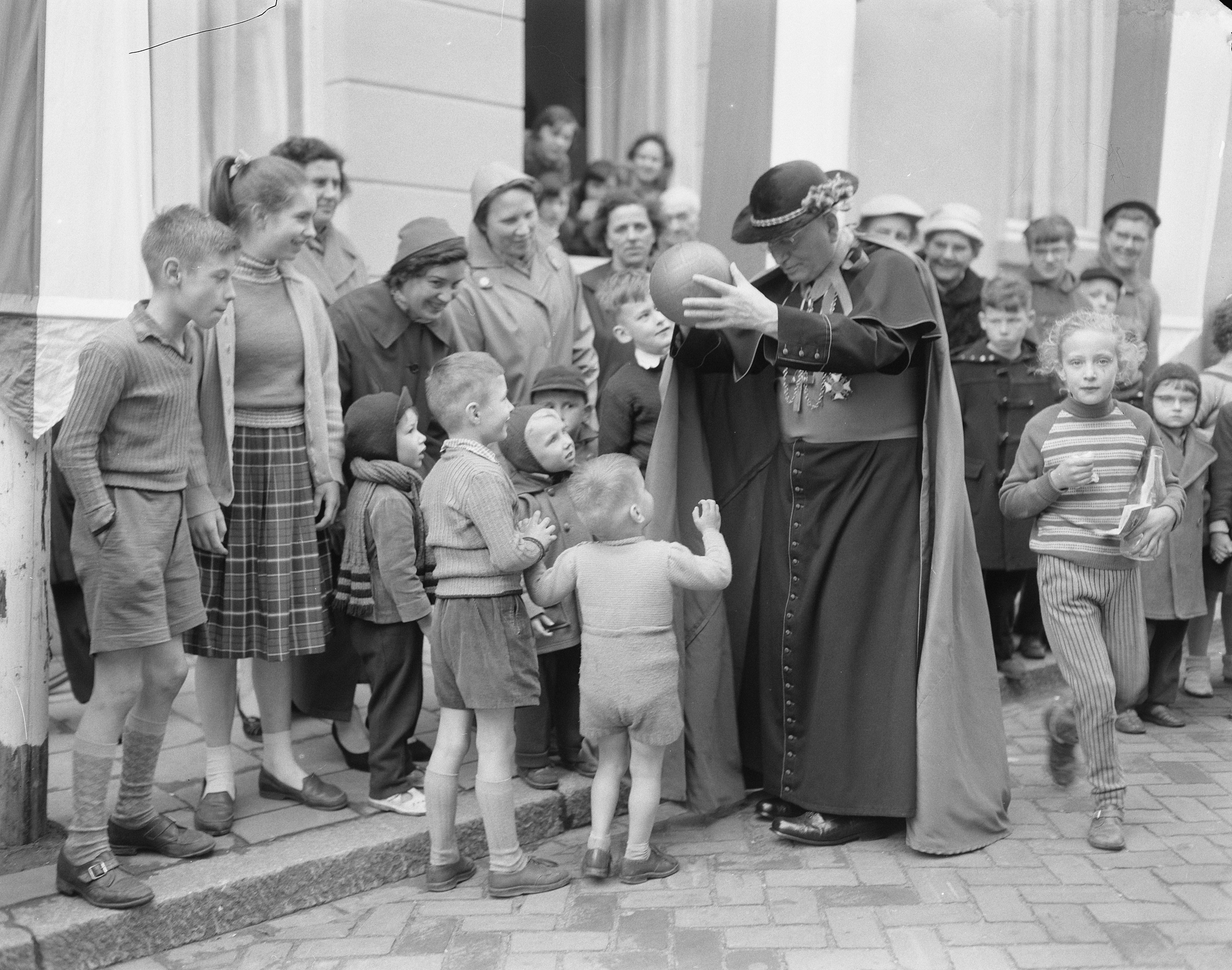 Collectie / Archief : Fotocollectie Anefo Reportage / Serie : [ onbekend ] Beschrijving : Monseigneur J. H. G. Lemmens 25 jaar bisschop van Roermond Datum : 19 maart 1957 Locatie : Limburg, Roermond Trefwoorden : bisschoppen Persoonsnaam : Lemmens, J.H.G. Fotograaf : Bilsen, Joop van / Anefo Auteursrechthebbende : Nationaal Archief Materiaalsoort : Negatief (zwart/wit) Nummer archiefinventaris : bekijk toegang 2.24.01.04 Bestanddeelnummer : 908-4110